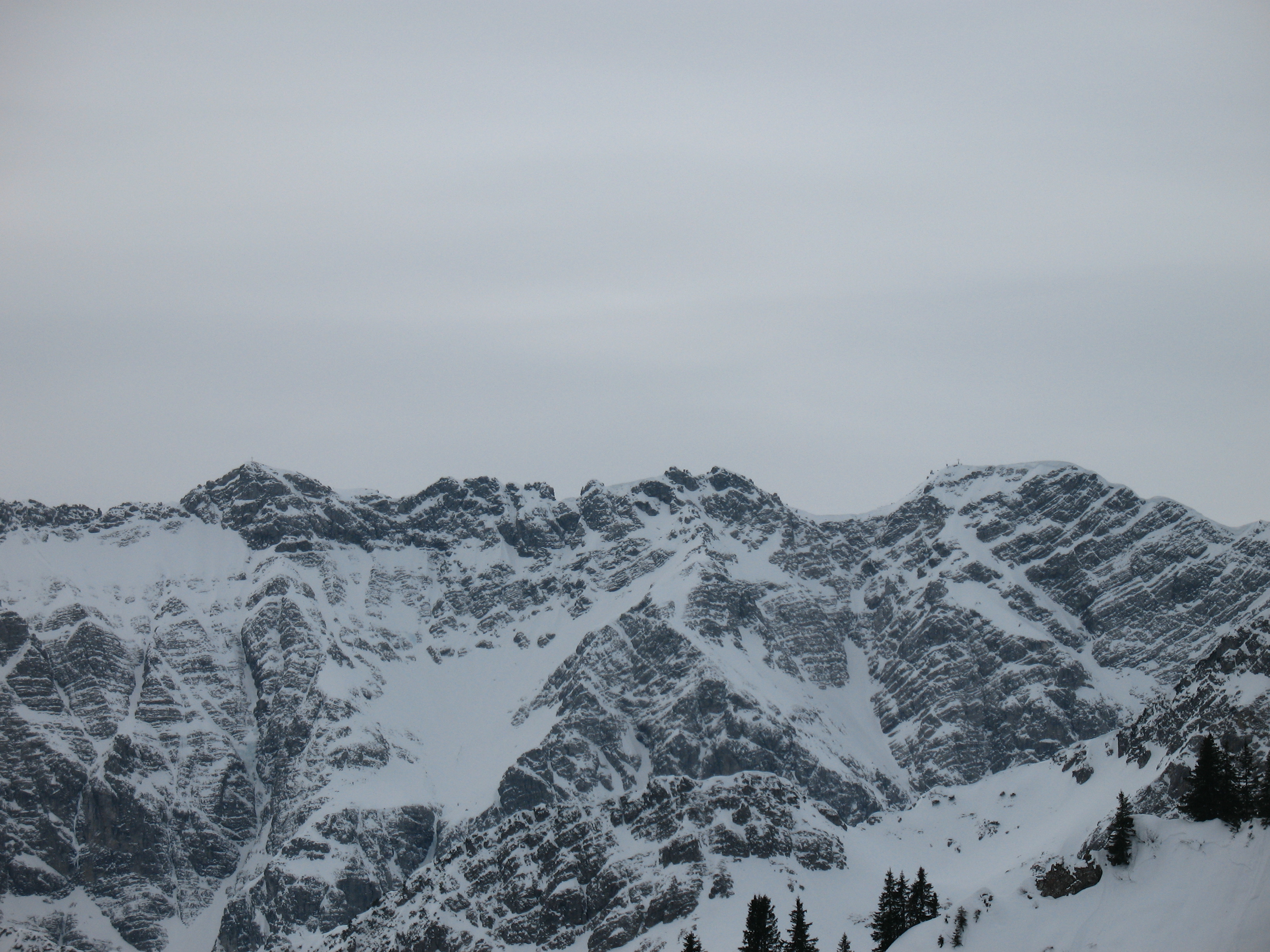 Blick vom Schnippenkopf auf den Westlichen Wengenkopf (2235 m) und das Nebelhorn (2224 m).